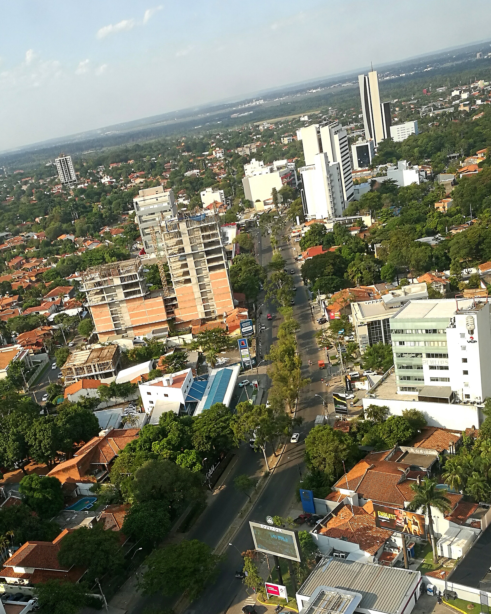 Vista de la Avenida Aviadores del Chaco en Asunción, Paraguay